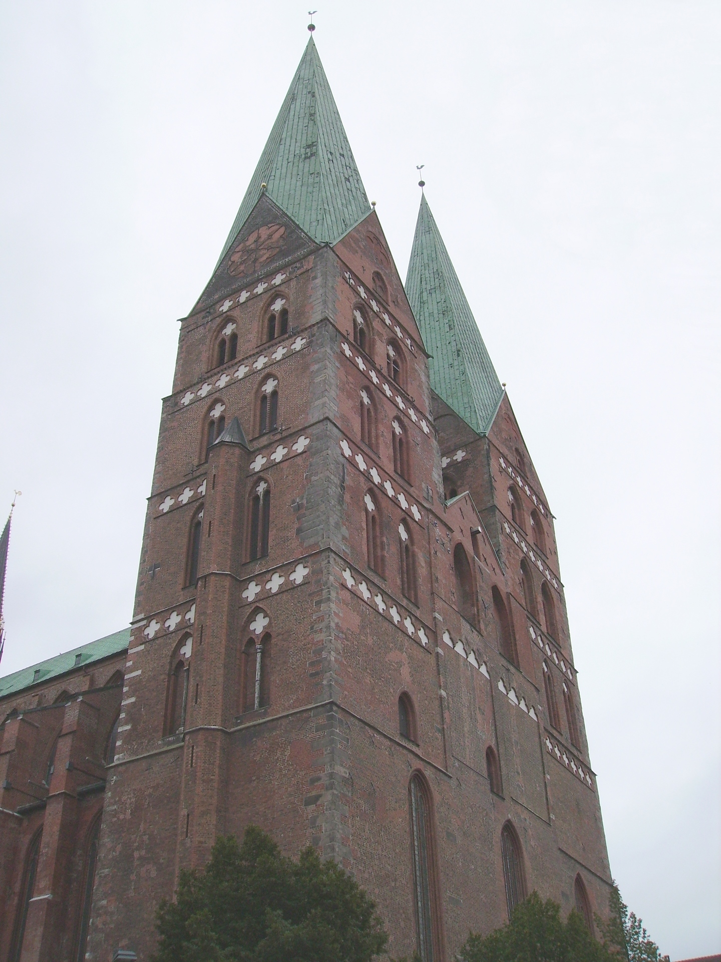 Türme der Kirche St. Marien in Lübeck